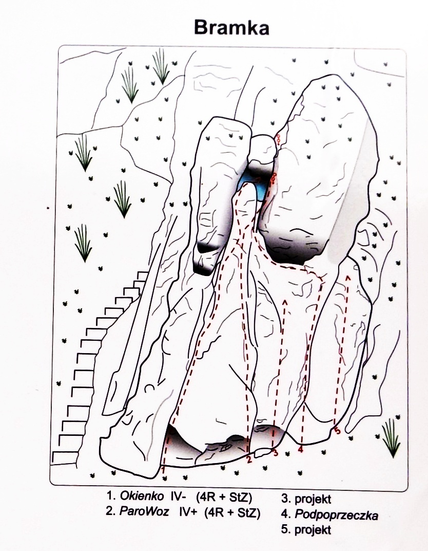 Skałoplan skały Bramka na podstawie tablicy zamontowanej przy Skałach nad Boiskiem w Dubiu